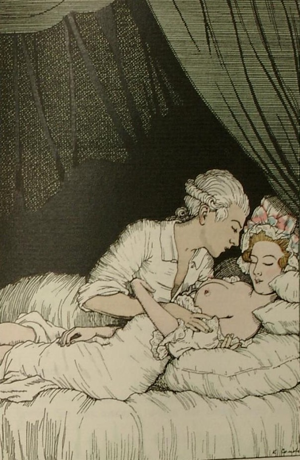 Constantin Somoff - Montade und die Gräfin. Aus Franz Blei & Constantin Somoff: Das Lesebuch der Marquise. Ein Rokokobuch. München, Hans von Weber, 1908